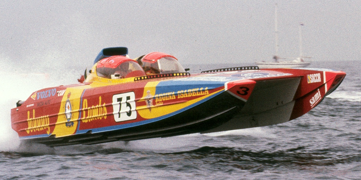 Offshore-Rennboot in Oostende (BEL)